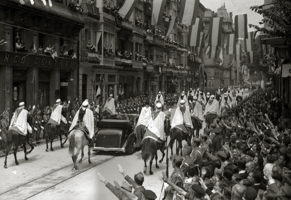 Título original: Francisco Franco escoltado por la Guardia Mora visita San Sebastián una vez finalizada la guerra (8/8) Localización: San Sebastián (Guipúzcoa)